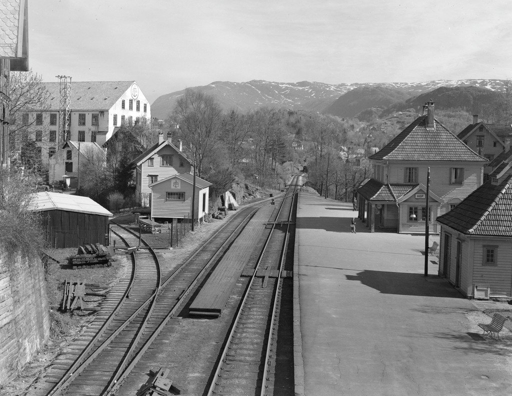 Hop stasjon med stasjonsbygning til høyre for sporene. Omtrent der den tidligere stasjonsbygningen stod, er det oppført et lite hus. Foto: Enoch Djupdræt, fra billedbasen Marcus.